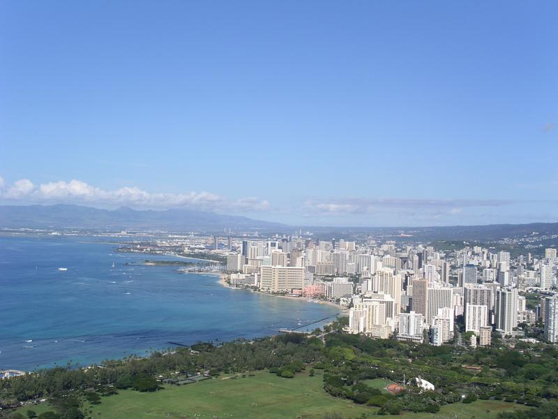 Waikiki-Strand auf Oahu/Hawaii